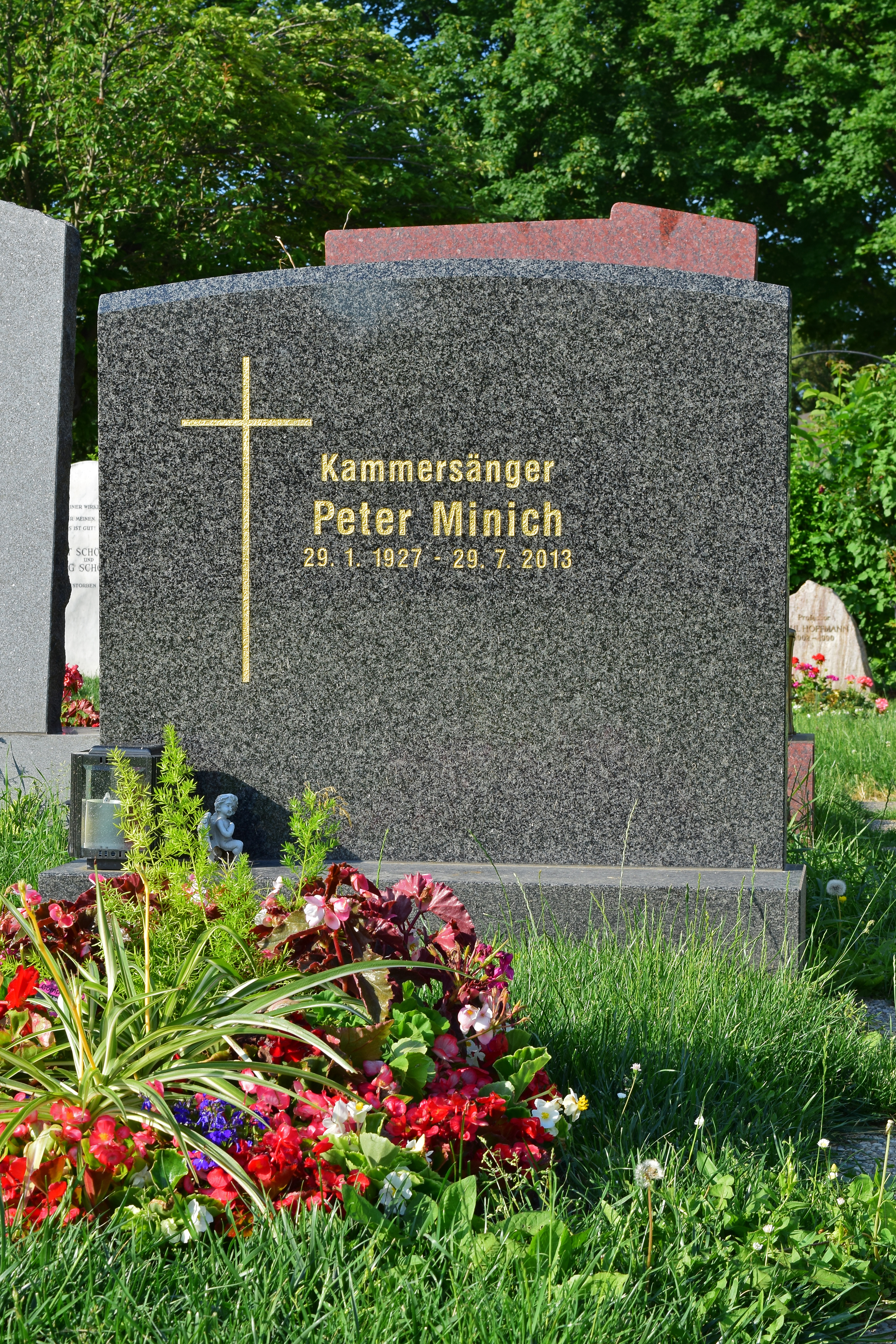 Ehrenhalber gewidmetes Grab von Peter Minich auf dem Wiener Zentralfriedhof, Gruppe 40.